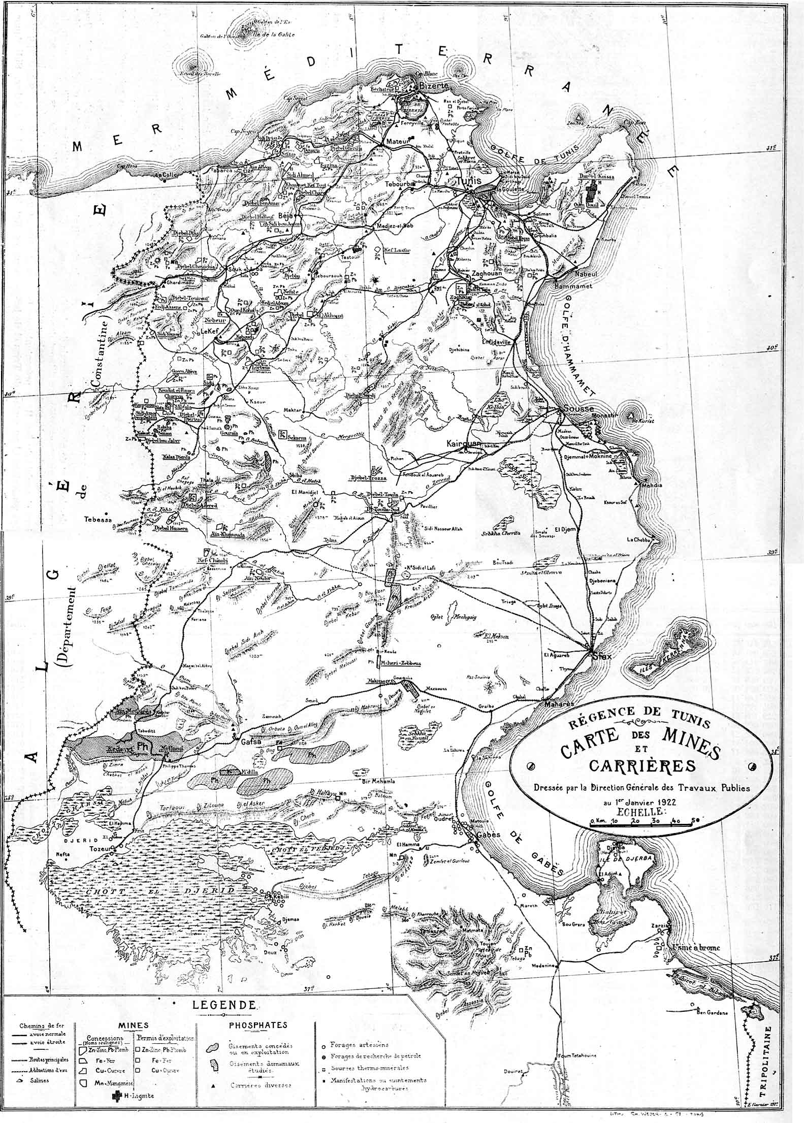 Cartes des mines et carrières - 1922